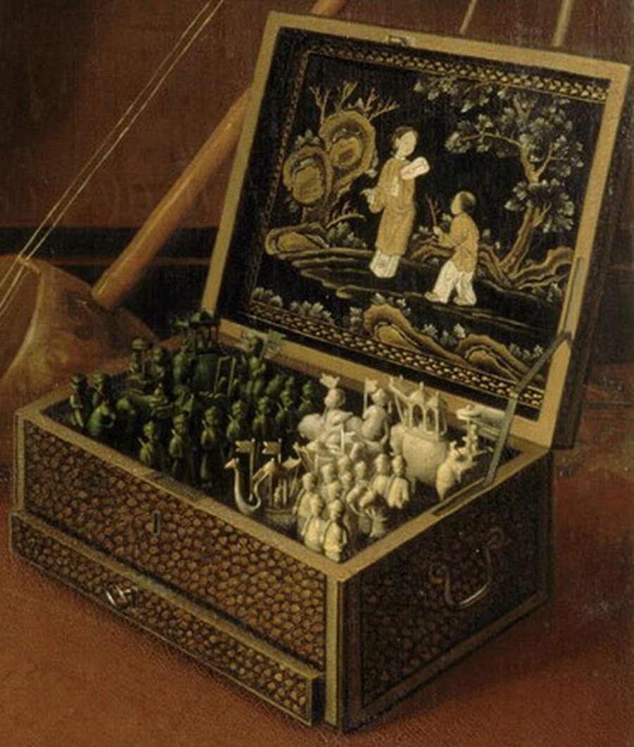 Пьер-Луи Делаваль. Кан Гао, китаец из Кайенны, 1821. Фрагмент картины.